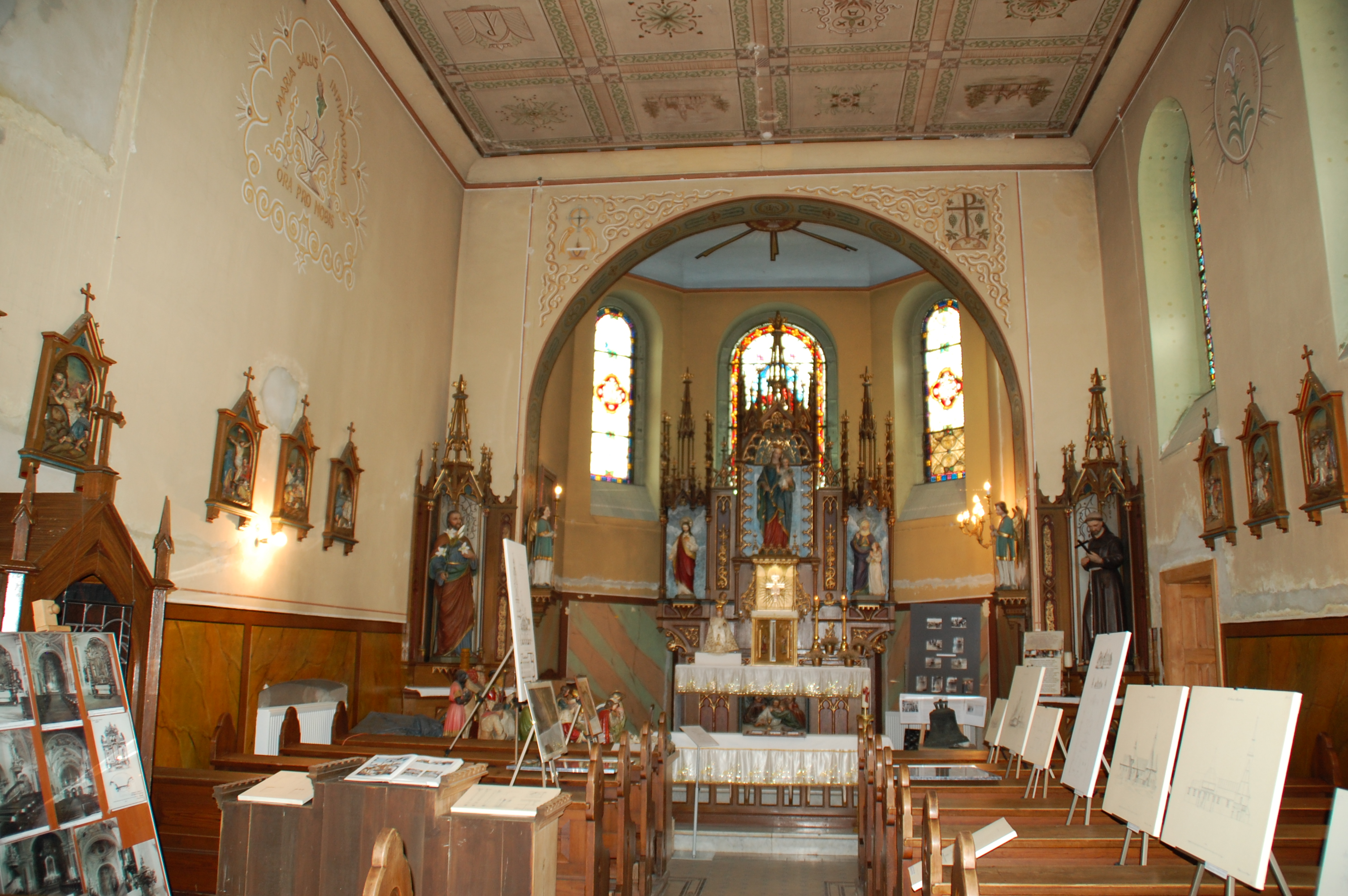 Krankenhauskapelle Olesno Innen